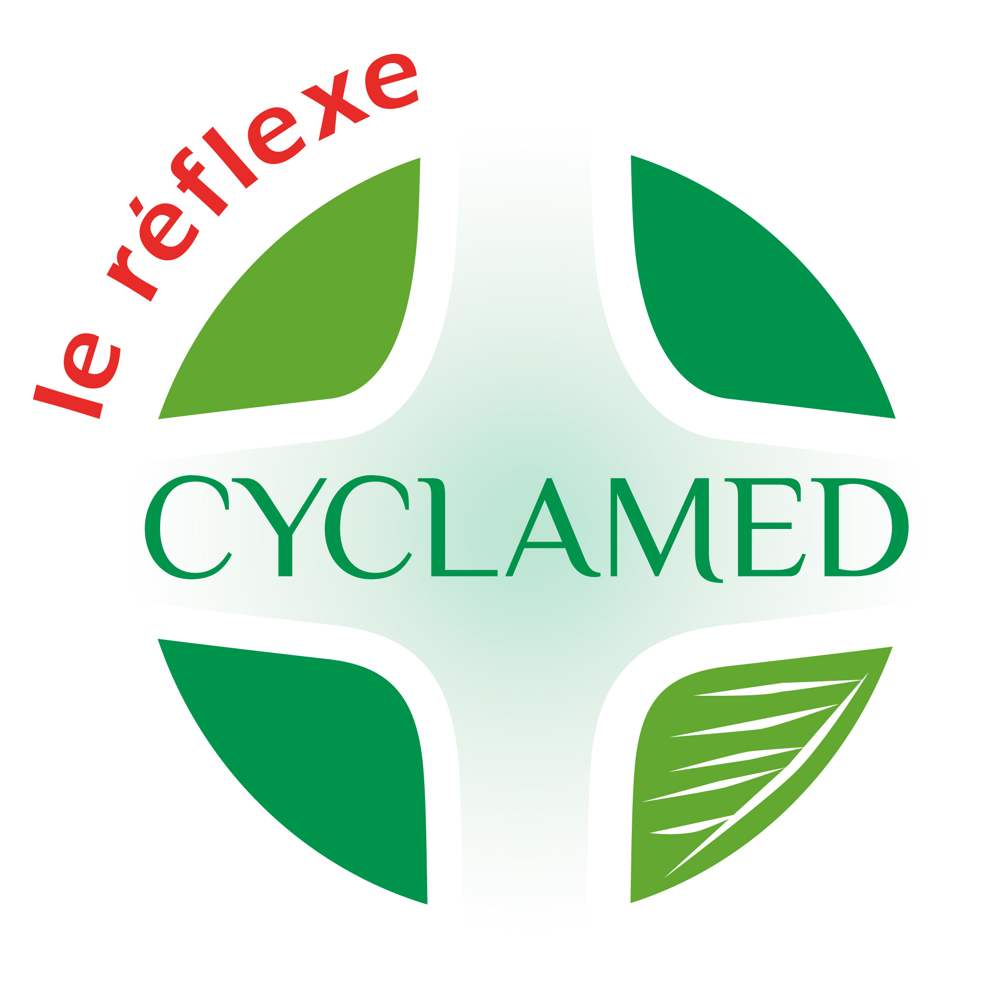 Logo-cyclamed